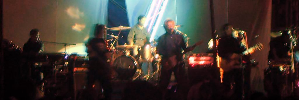 Los Pericos performing in Cholula, Puebla, Mexico